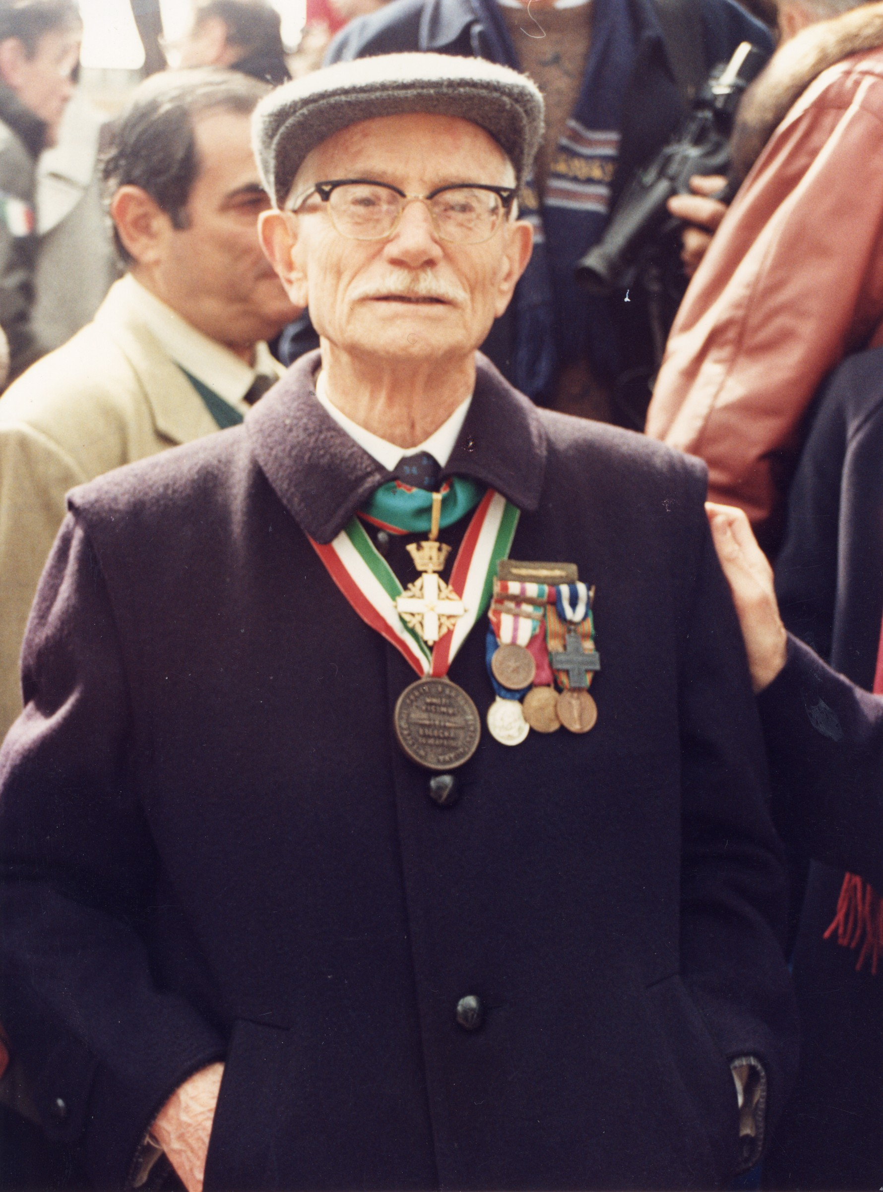 foto di Armando Izzo